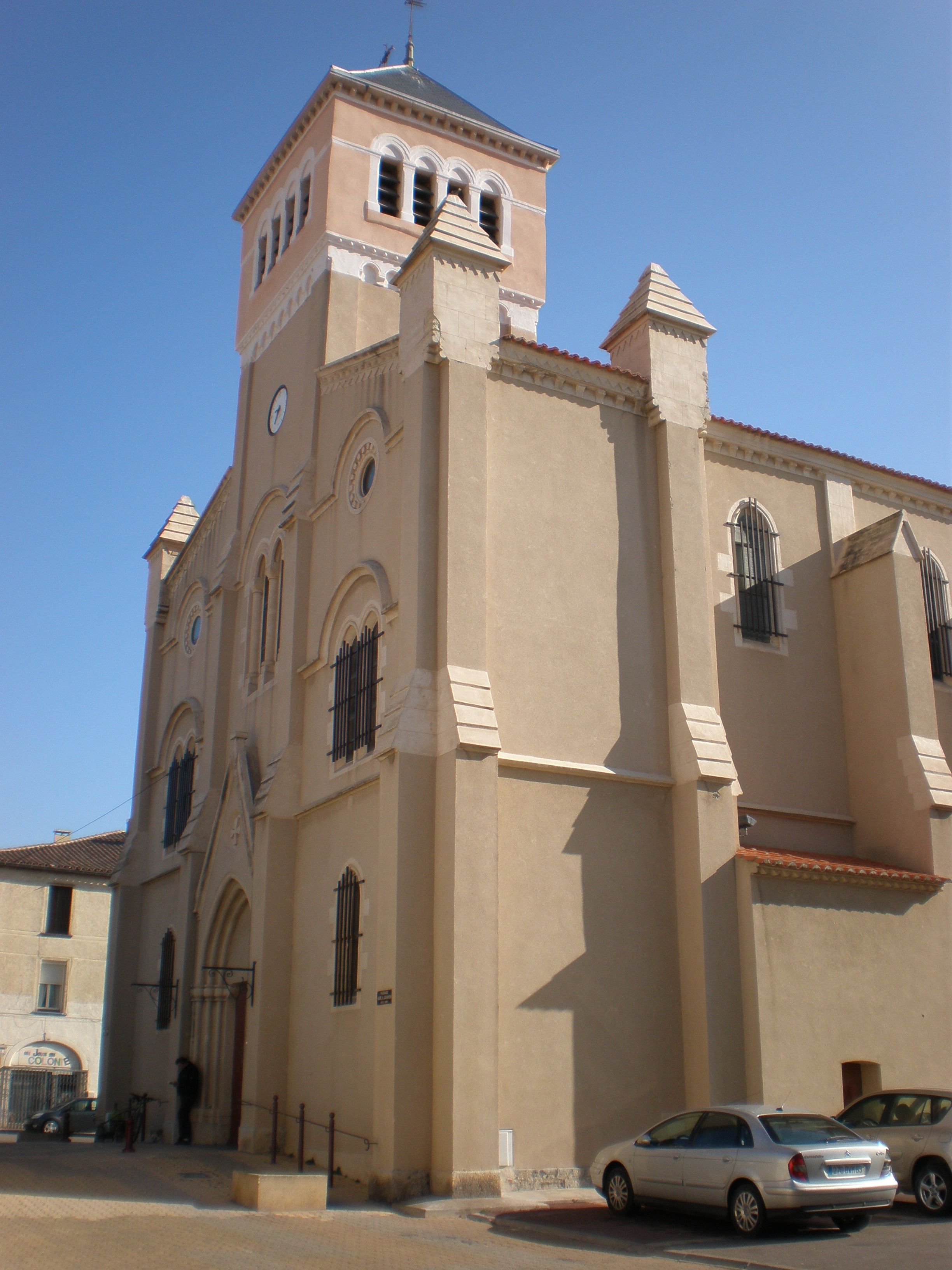 Eglise Notre-Dame-de-Bon-Voyage de Port-la-Nouvelle (Aude, France)